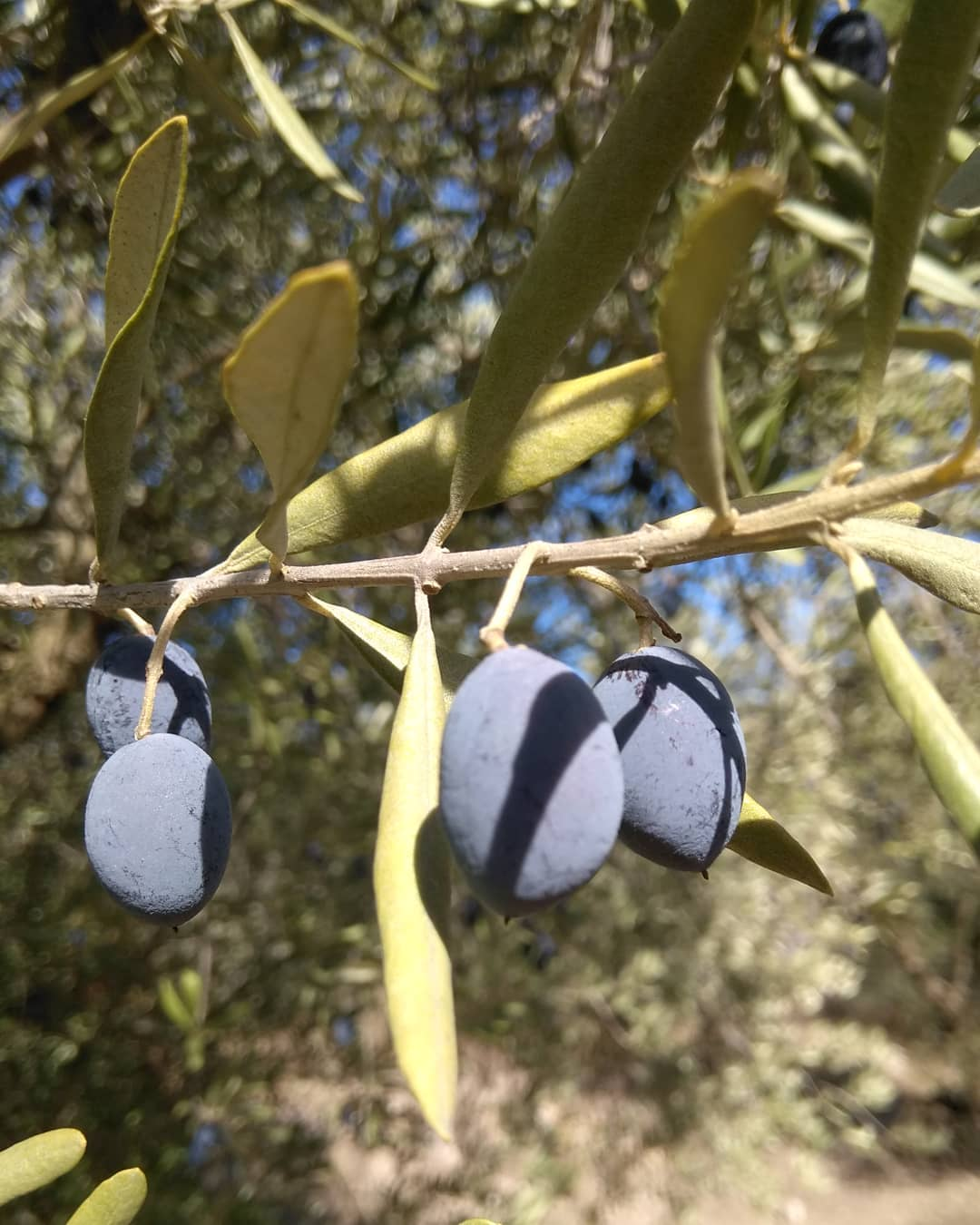 olives noires